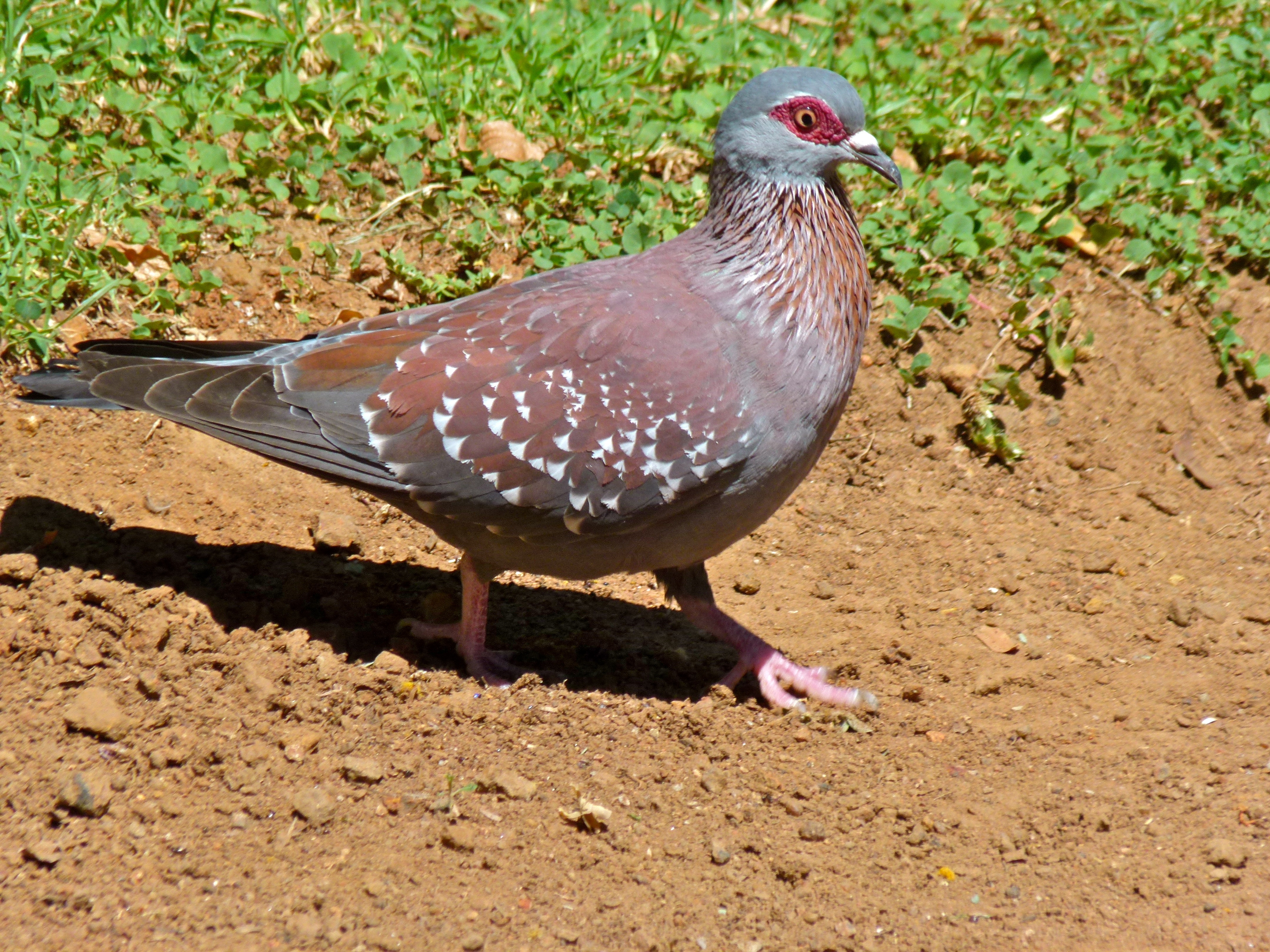 Manyane Resort, Pilanesberg, SOUTH AFRICA